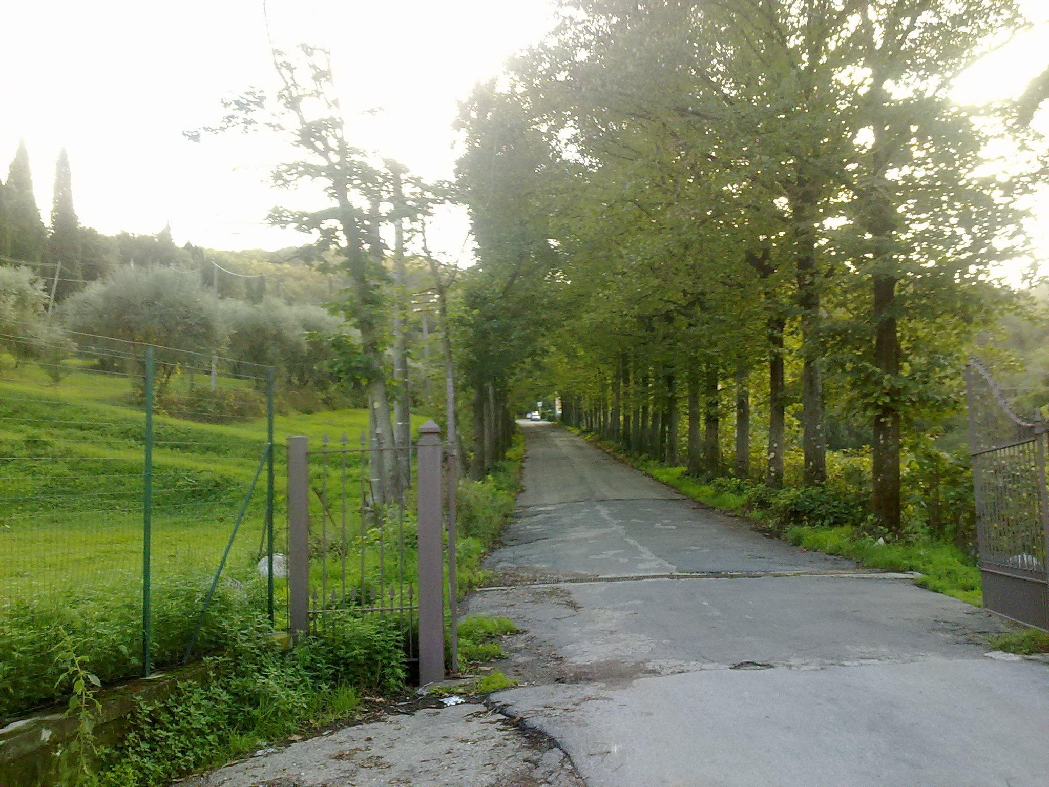 Entrata della sorgente Fontepatri a Lastra a Signa.